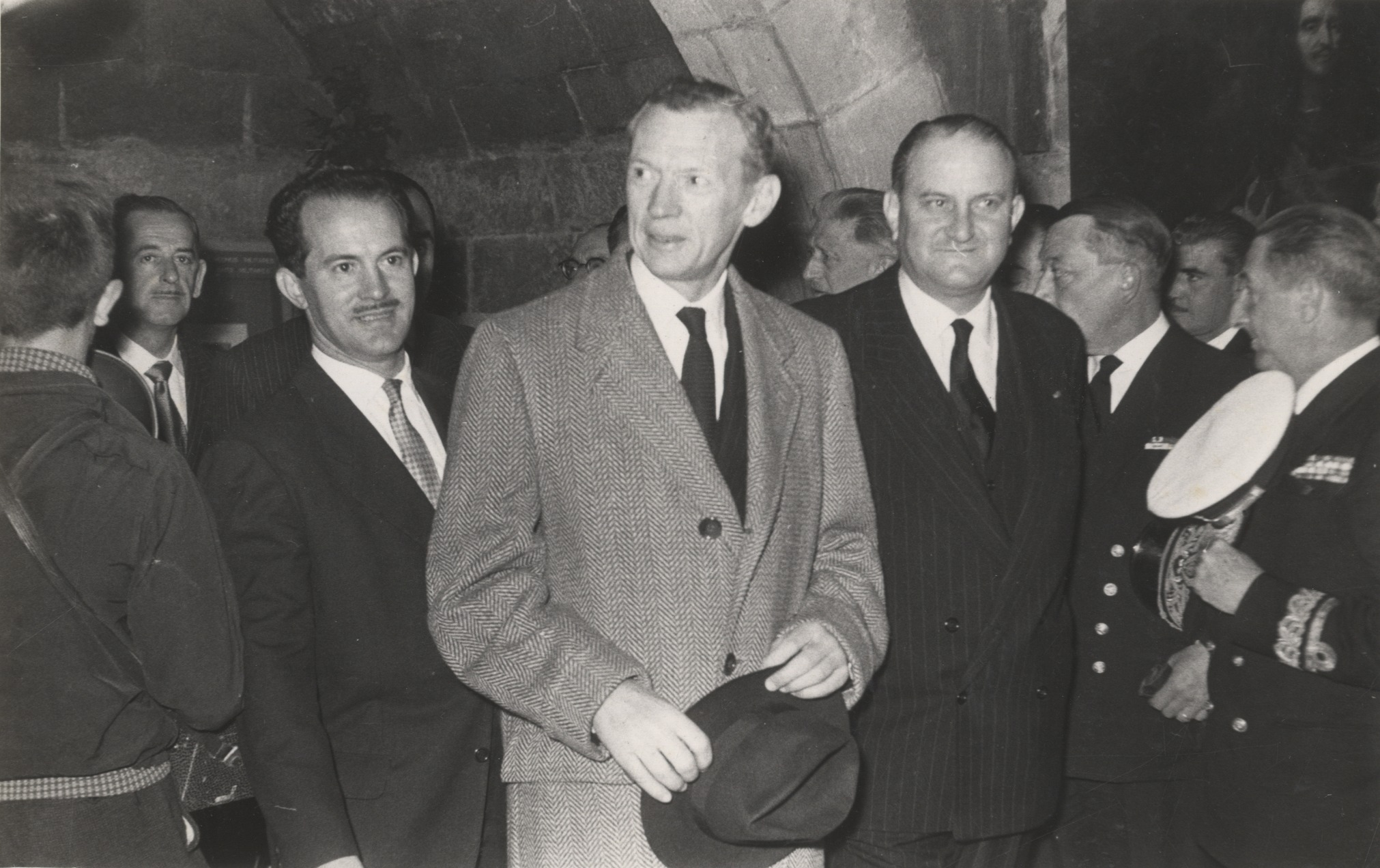 Título original: Actos conmemorativos del tricentenario de la Paz de los Pirineos : los ministros de Asuntos Exteriores de España y Francia, Fernando Castiella y Maurice Couve de Murville en el castillo de Carlos V. Localización: Hondarribia